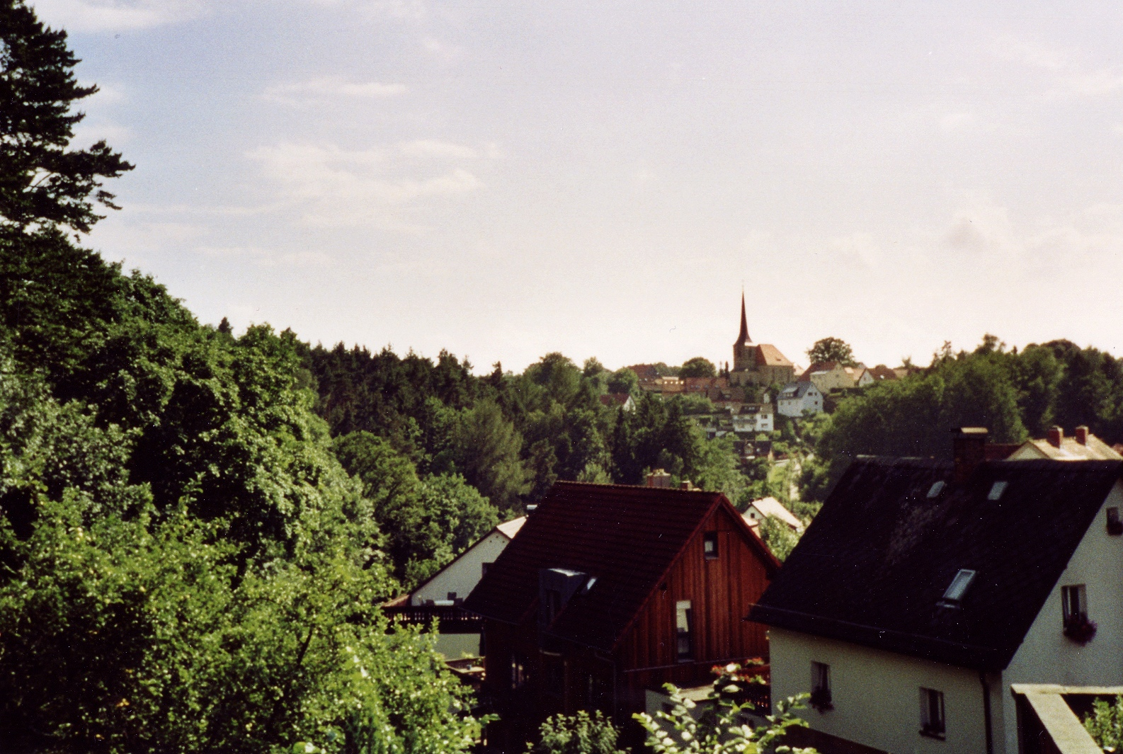 Eckersdorf mit der Kirche St. Ägidius, fotografiert vom Hotel Fantasie aus